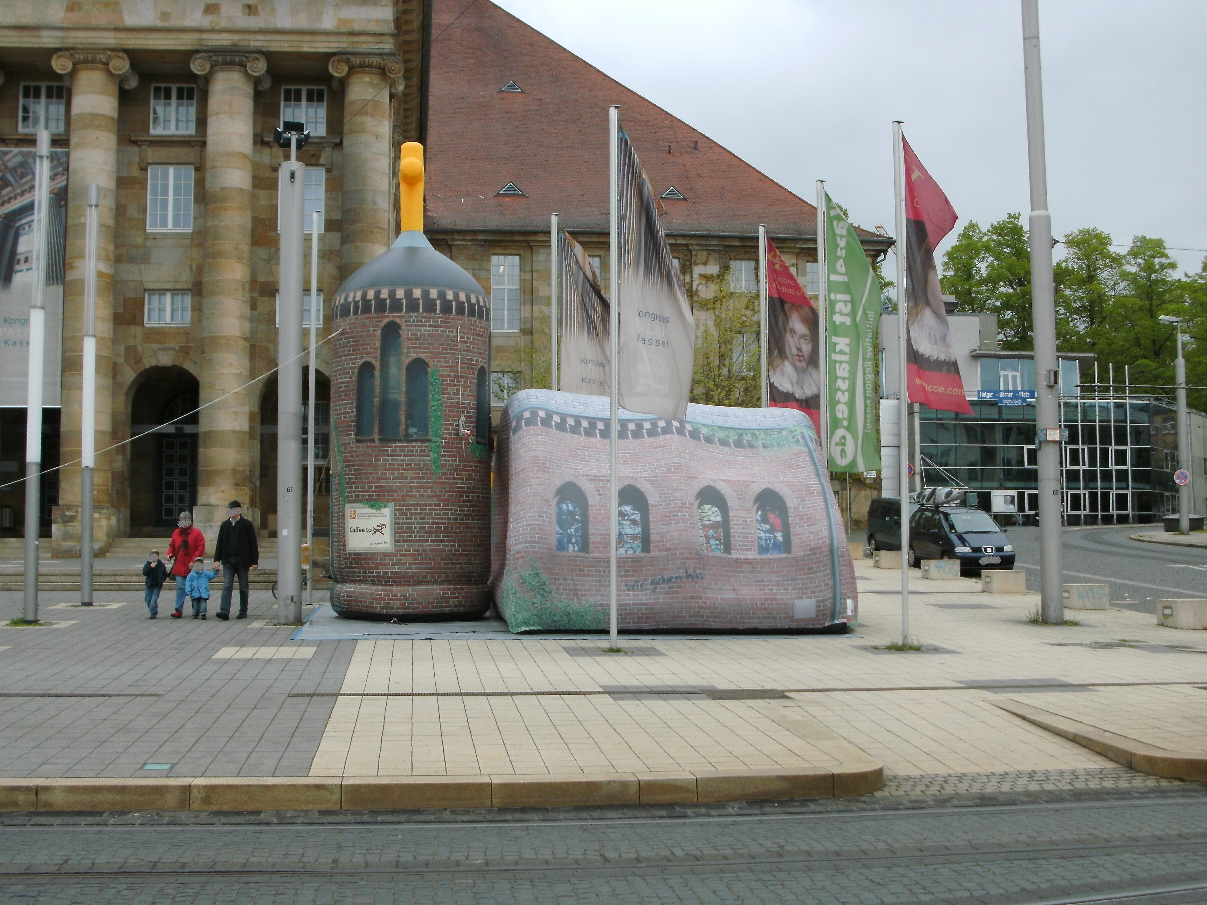 Zeltkirche des Bundes Evangelisch-Freikirchlicher Gemeinden in Deutschland vor der Stadthalle Kassel, Hessen, Deutschland